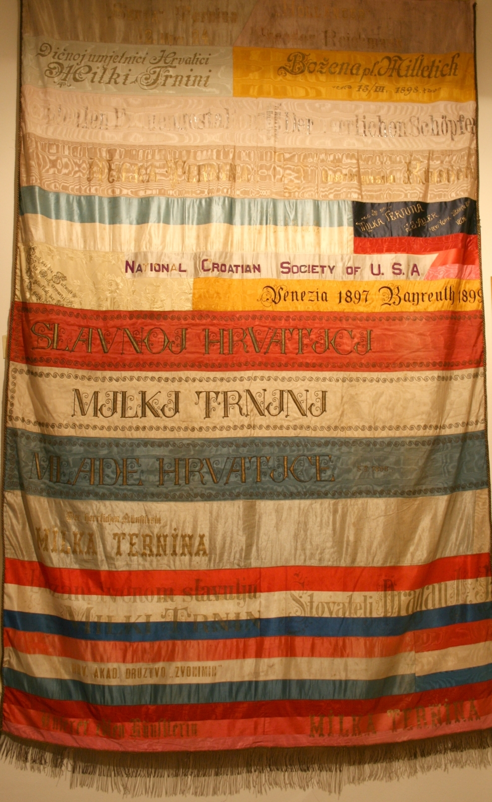 Vrpce s vijenaca i stručaka cvijeća Milke Trnine sašivene u zavjesu, Zagreb oko 1890. godine, snimljeno u Muzeju grada Zagreba